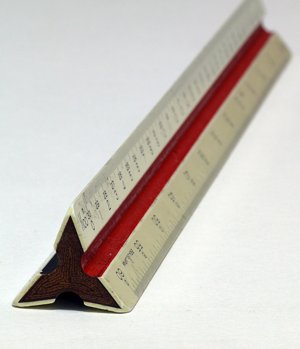 An architectural scale (建築用三角スケール)